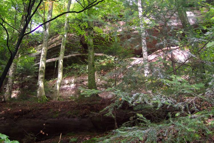 Paysage rocheux autour de Dabo en Lorraine.